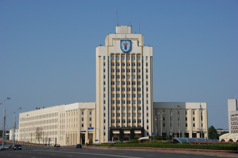 Uniwersytet Pedagogiczny